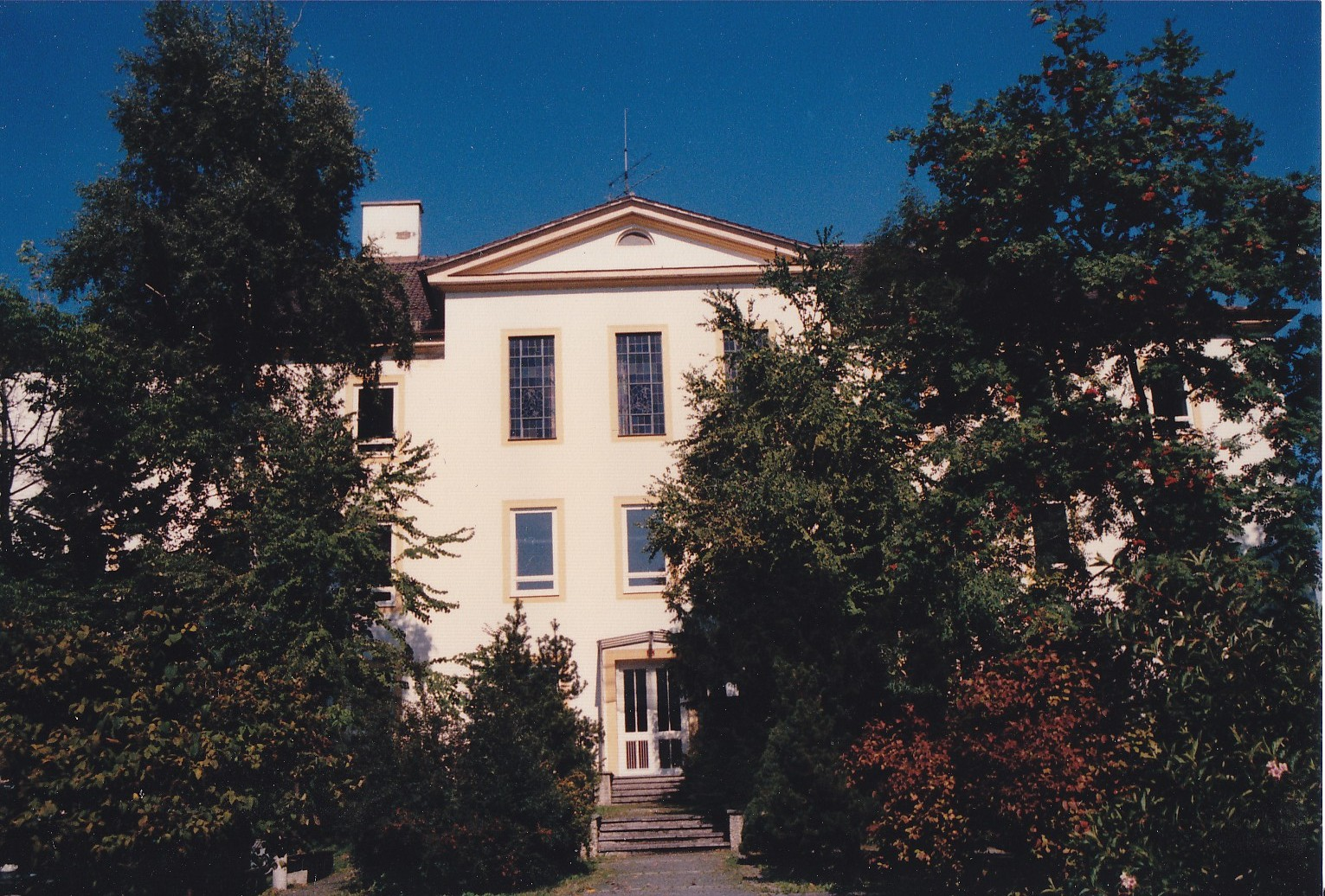 Gebäude in der Kammergasse, in dem sich ausgelagerte Unterrichtsräume befanden